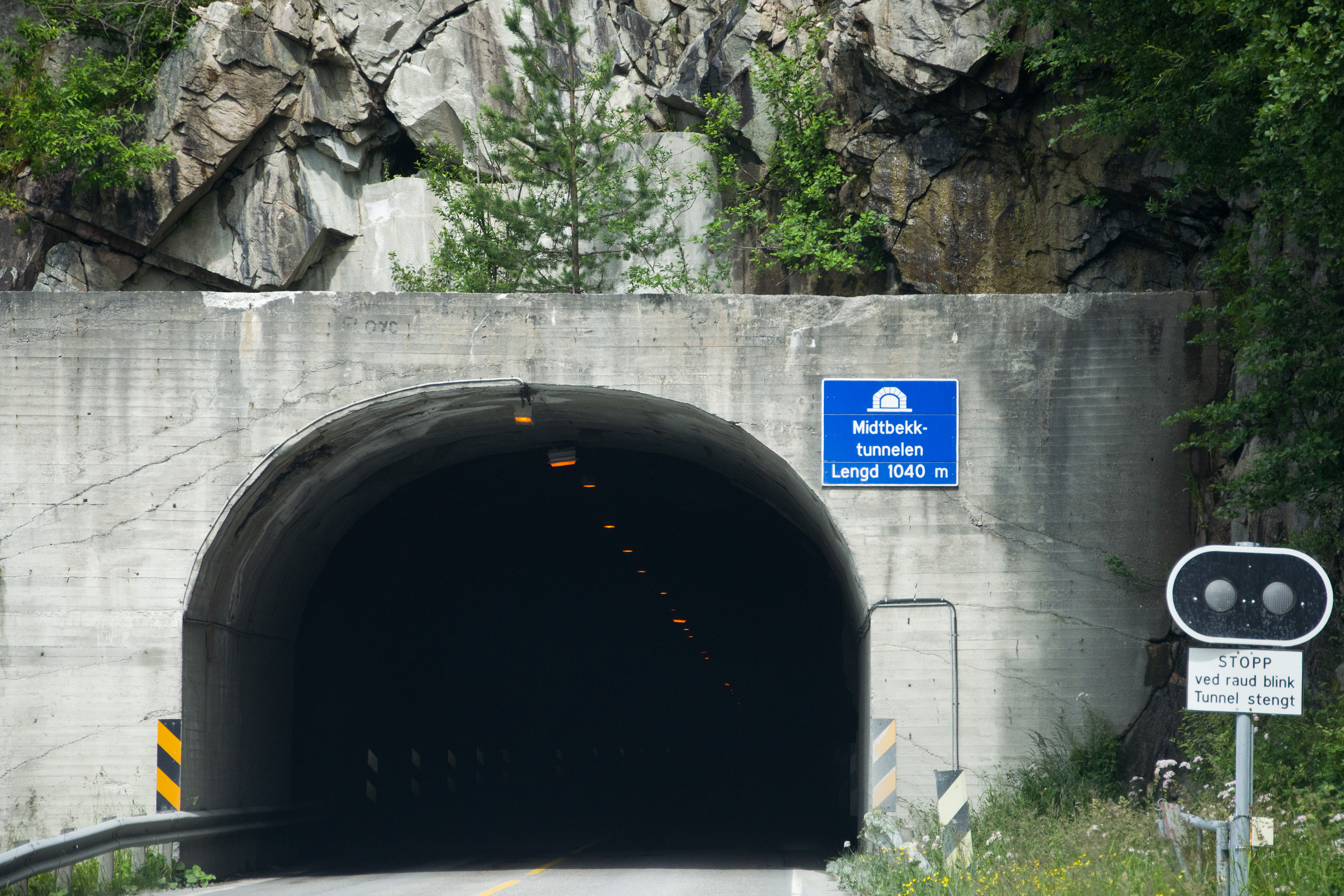 Midbekktunnelen på Riksvei 70 i Sunndal kommune, Møre og Romsdal. Søndre innslag.